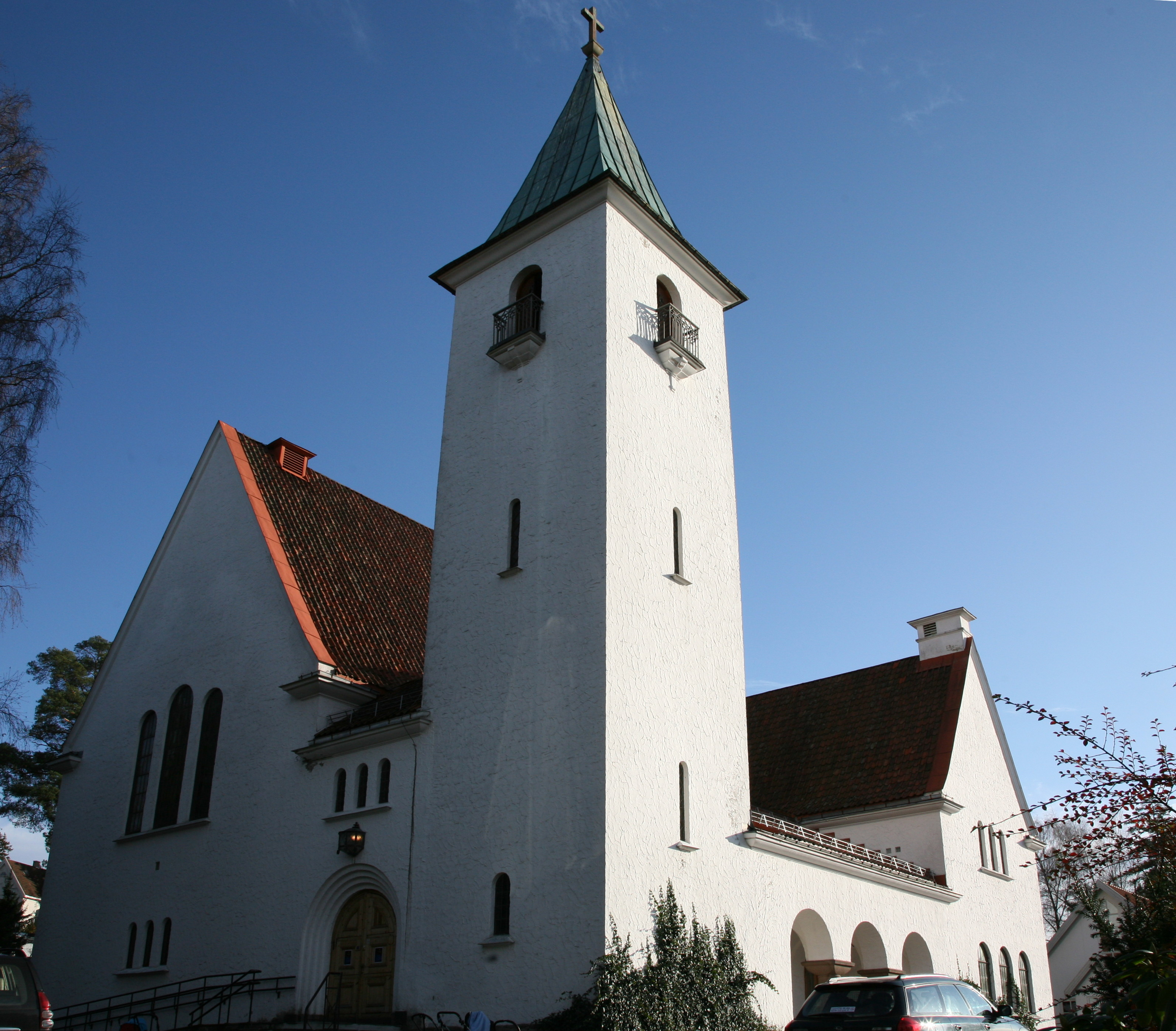 Bekkelaget kirke, a church in Oslo